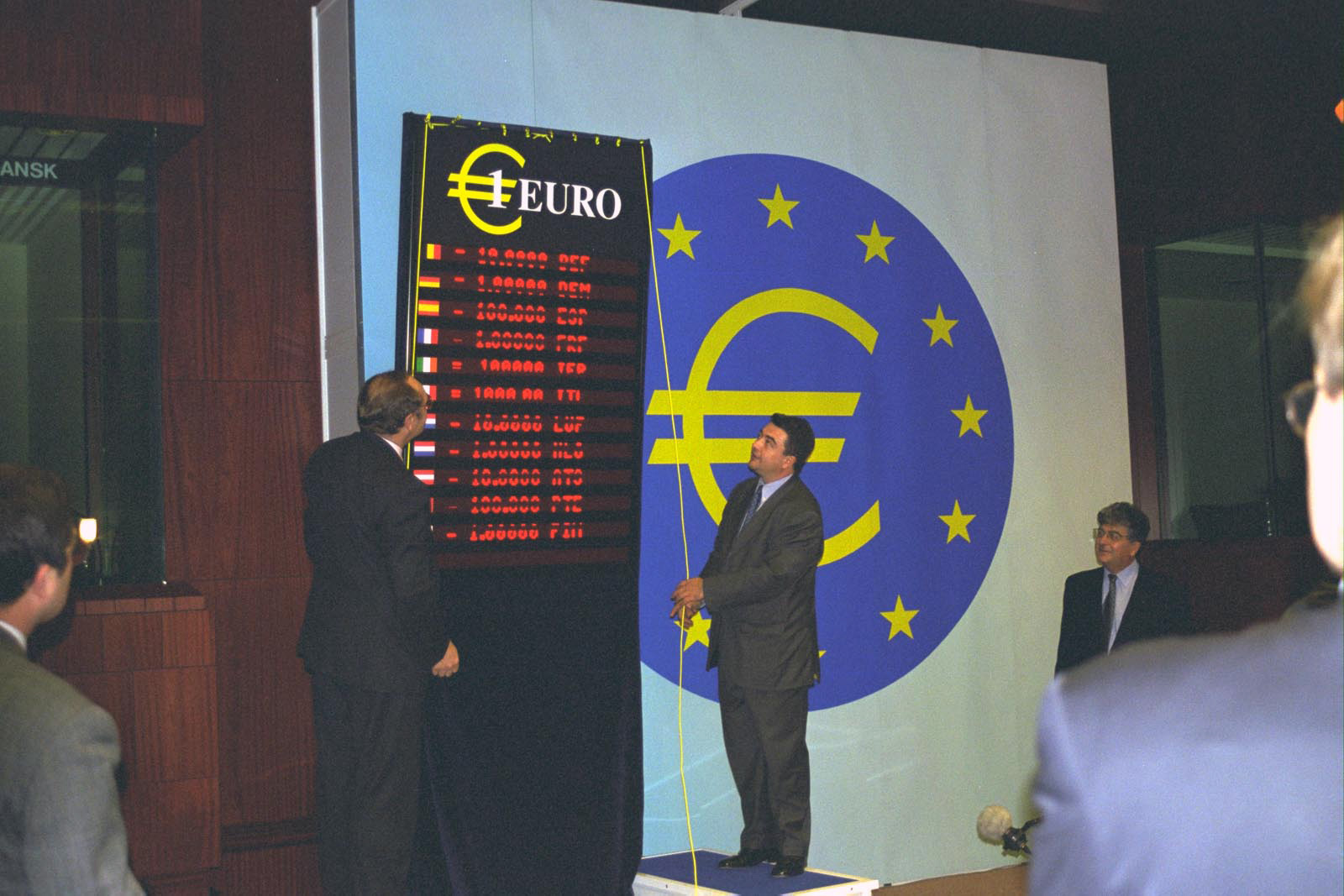 mise en route au parlement européen de la monnaie commune "euro"